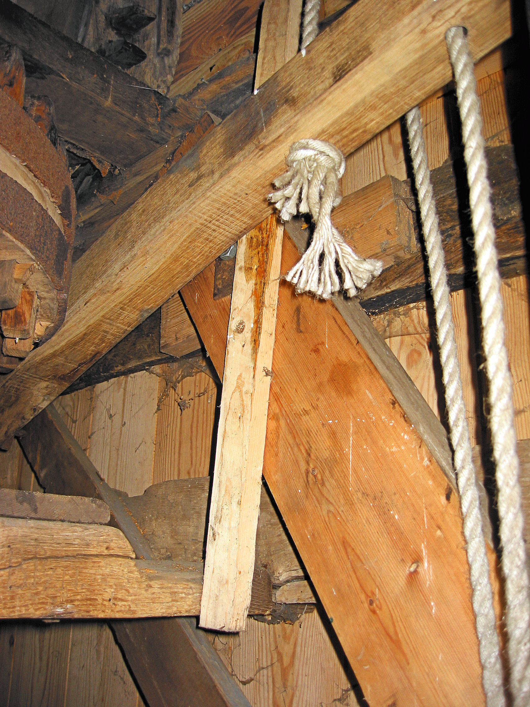 Spinnenkop trekvang